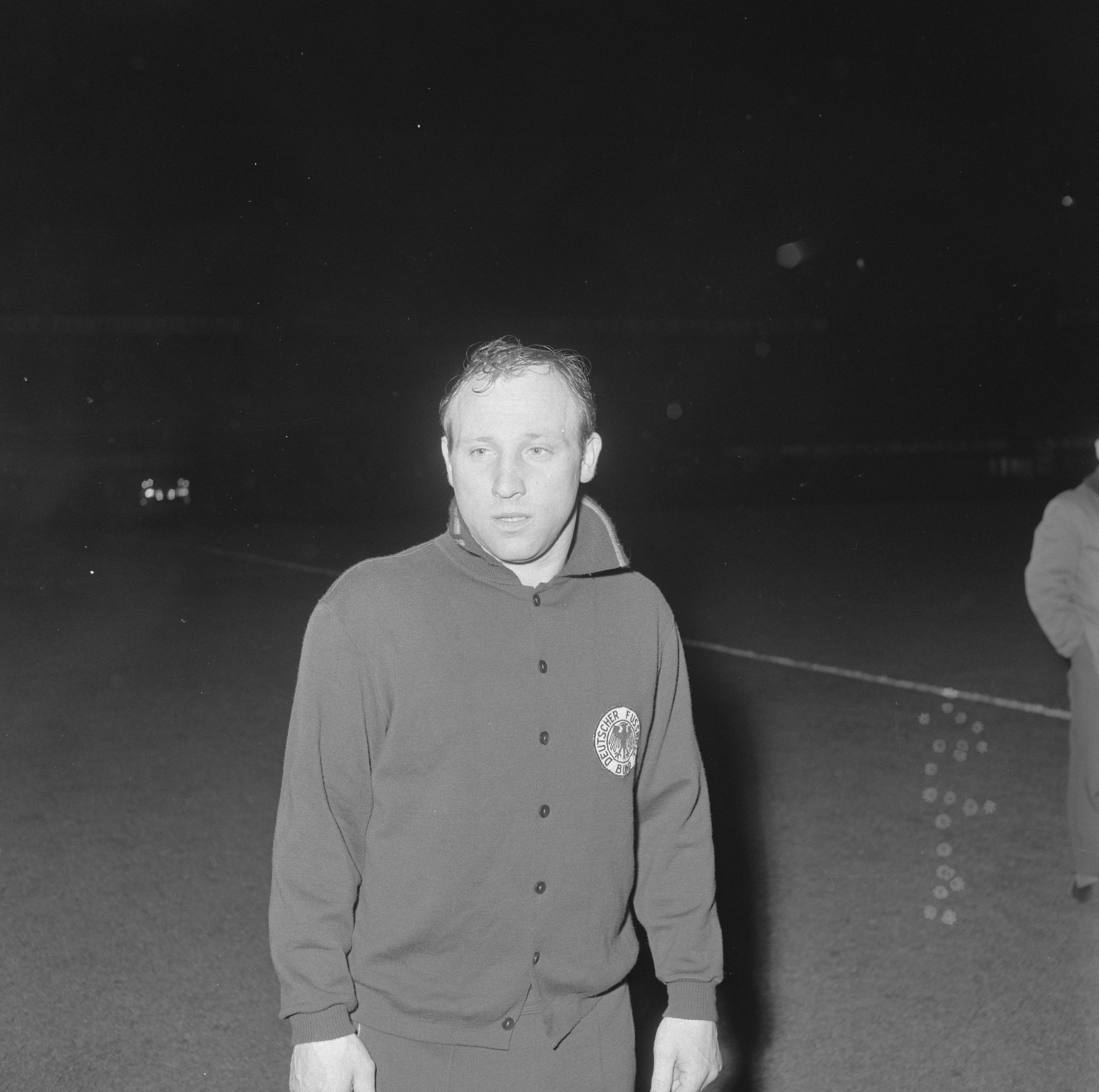 Collectie / Archief : Fotocollectie Anefo Reportage / Serie : [ onbekend ] Beschrijving : Het West-Duitse elftal zoals dat tegen Nederland zal uitkomen, Uwe Seeler (kop) Datum : 22 maart 1966 Trefwoorden : elftallen, sport, voetbal Persoonsnaam : Seeler, Uwe Fotograaf : Voets, Jan / Anefo Auteursrechthebbende : Nationaal Archief Materiaalsoort : Negatief (zwart/wit) Nummer archiefinventaris : bekijk toegang 2.24.01.03 Bestanddeelnummer : 918-9578